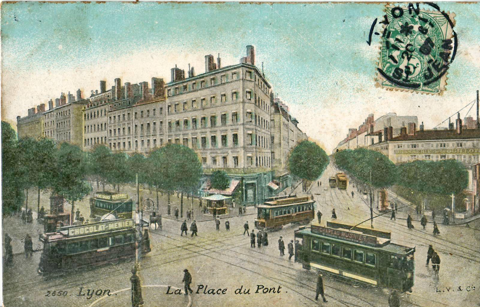 Carte postale ancienne éditée par L. V. & Cie (Aqua photo à Paris) n° 2650 :LYON - La Place du Pont